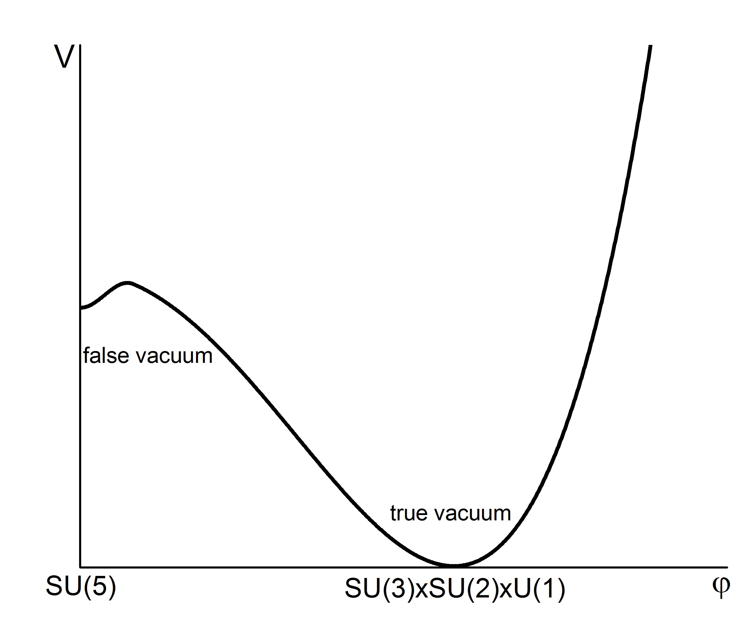 Coleman-Weinberg Potential2